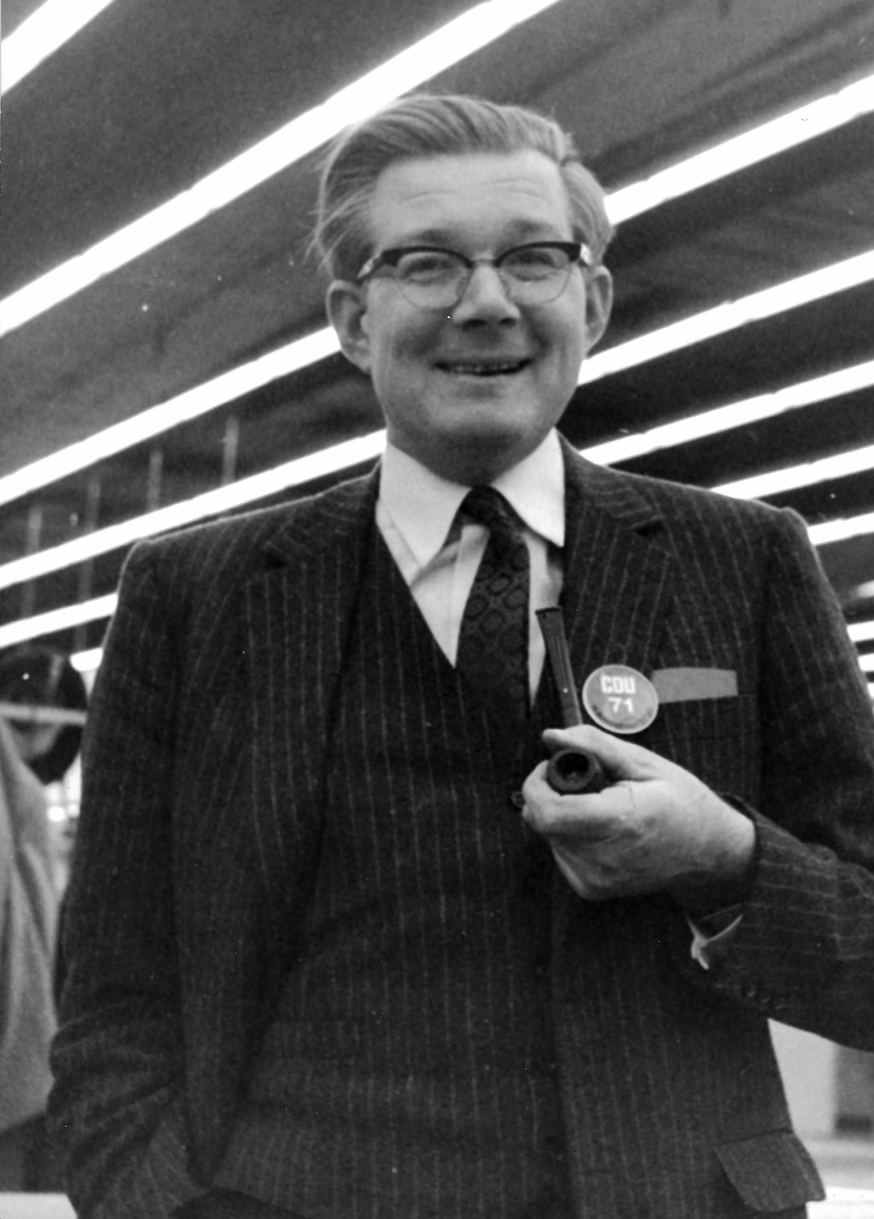 Ernst Benda; CDU-Bundesparteitag 1971 in Düsseldorf